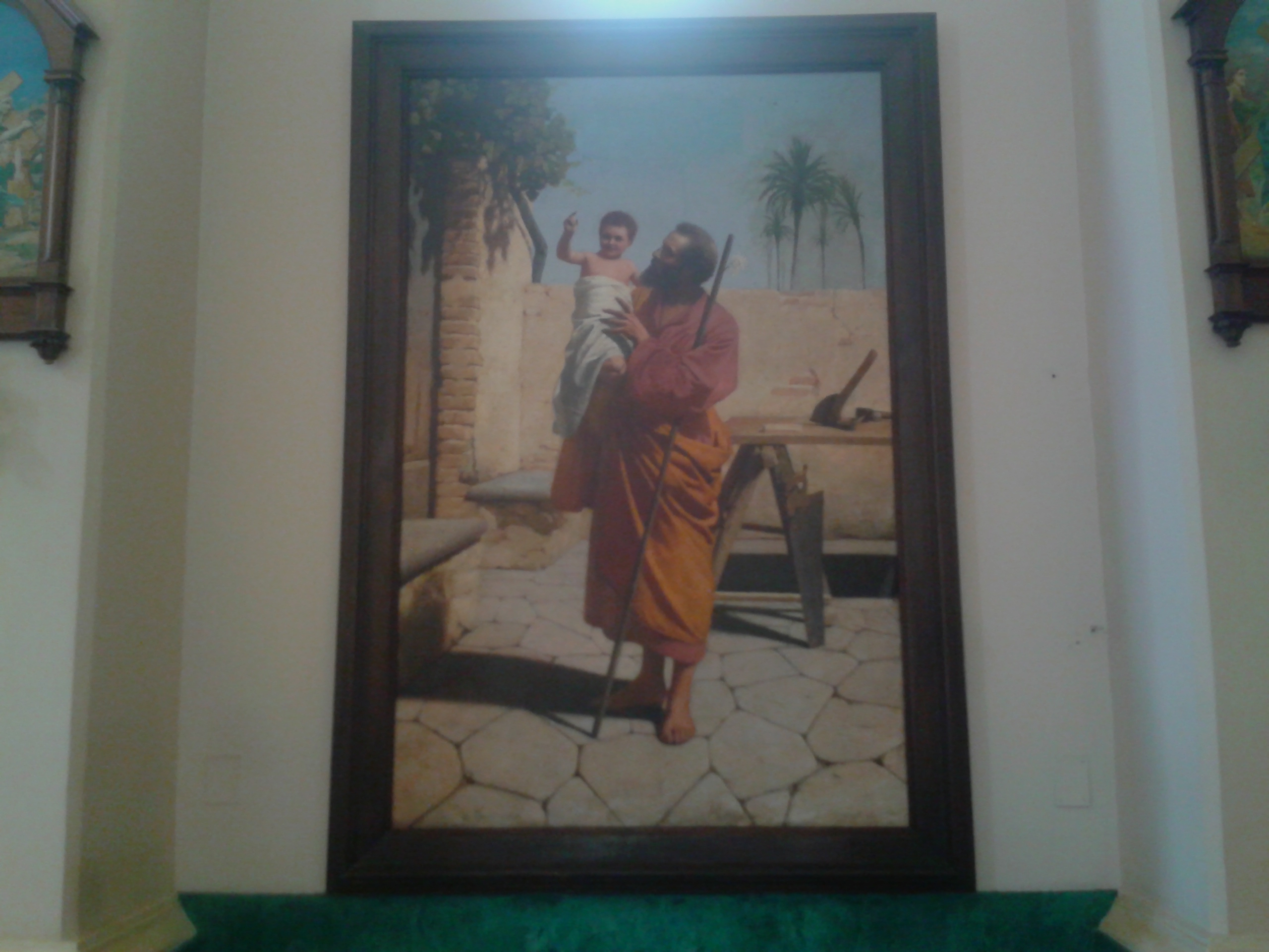 San Giuseppe con Bambino duomo di Palmi